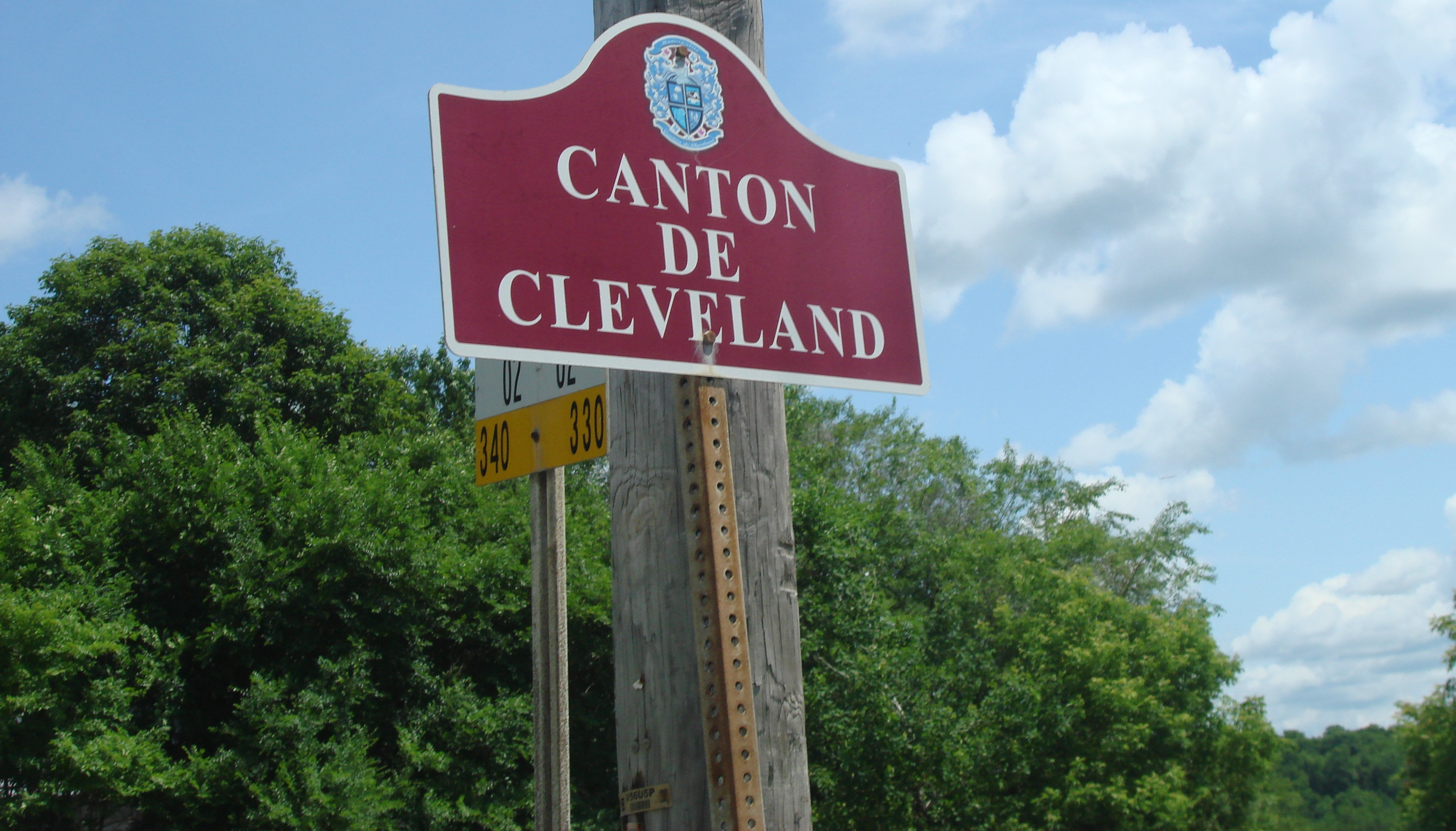 Bienvenue au Canton de Cleveland.